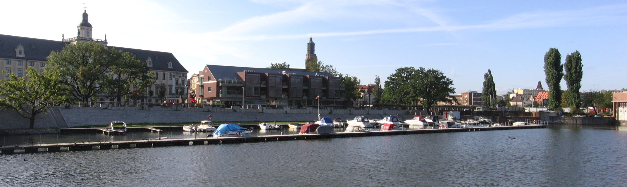 Odra w okolicach Mariny Śródmiejskiej: Marina Śródmiejska we Wrocławiu (pośrodku), po lewej Uniwesytet Wrocławski, w centrum kadru nad mariną – wieża Kościoła Garnizonowego pw. św. Elżbiety